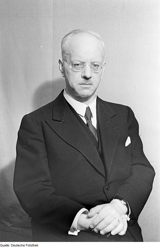 Original image description from the Deutsche Fotothek Porträts: Prof. [Max ?] Pechstein, [Johannes?] Stroux, Kraus, Benedik, Lederer, Theodor Plivier, Prof. Victor Klemperer und Klaus Gysi